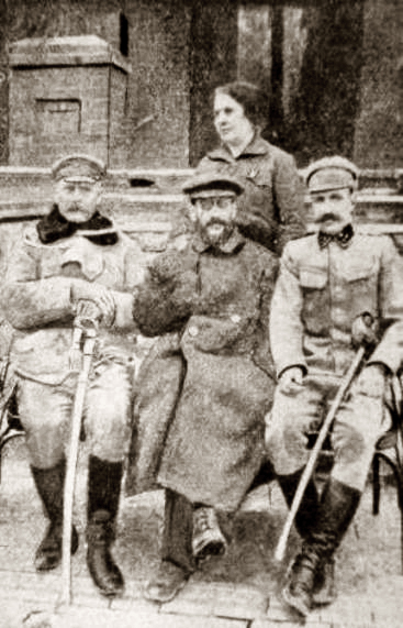 R. jaworowski, F. Perl, J. Perlowa, T. Arciszewski w Łodzi w 1915 r.